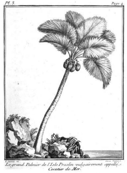 Le grand palmier de l'Isle de Praslin vulgairement appelé Cocotier de mer.